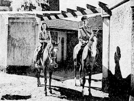 Tito Lívio Fleury Martins e Norma Lopes em uma das primeiras cenas do filme Terra e Espada, da Cia. Americana de Filmes.